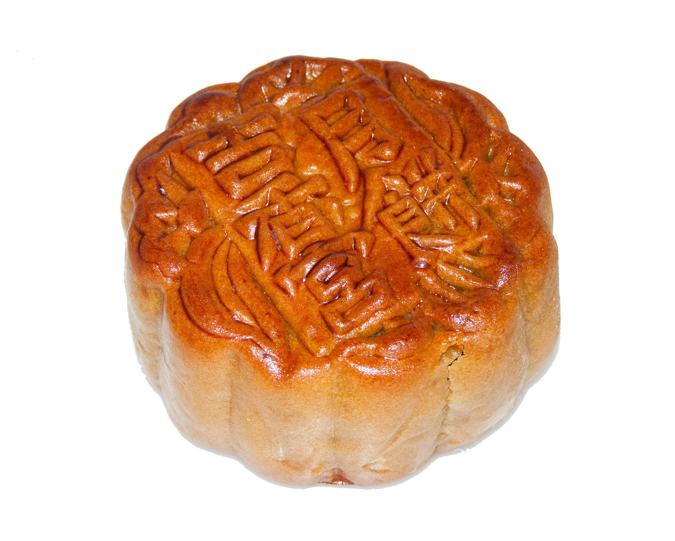 A mooncake